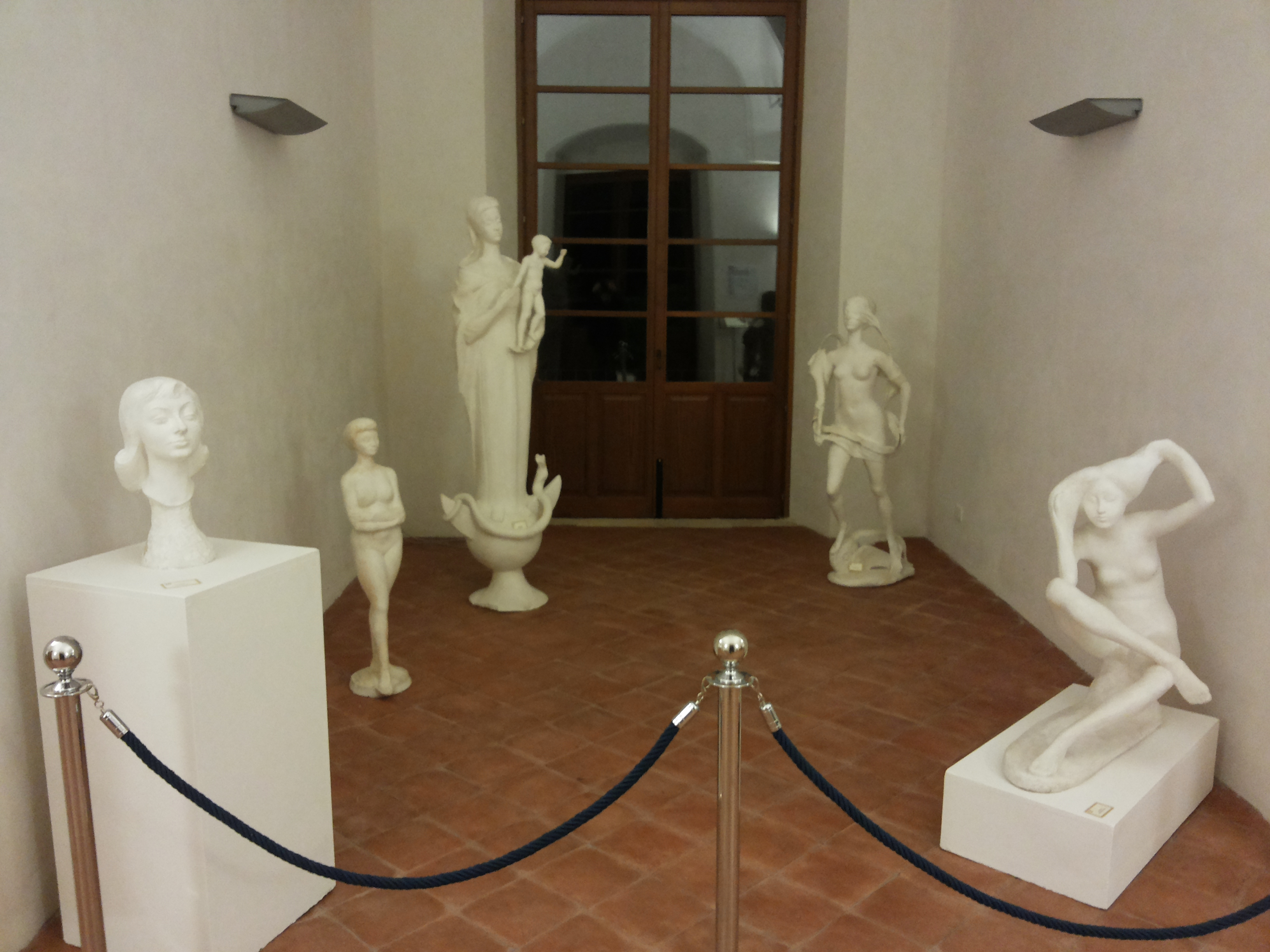 Sculture in gesso di Nino Rubino. In esposizione all'interno dell'ex Collegio dei Gesuiti di Alcamo